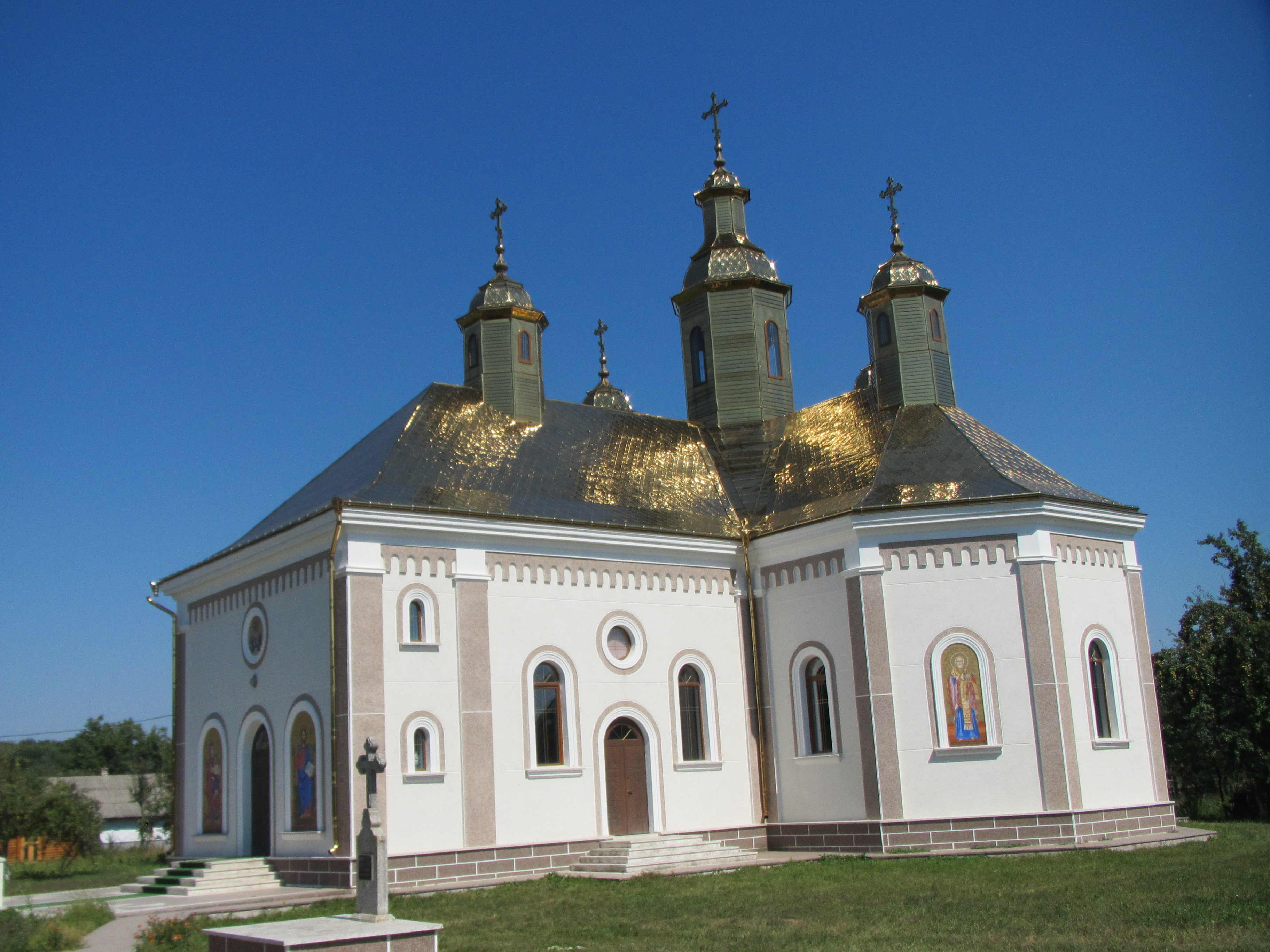 Українська Православна Свято-Вознесенська церква в с. Банилів-Підгірний